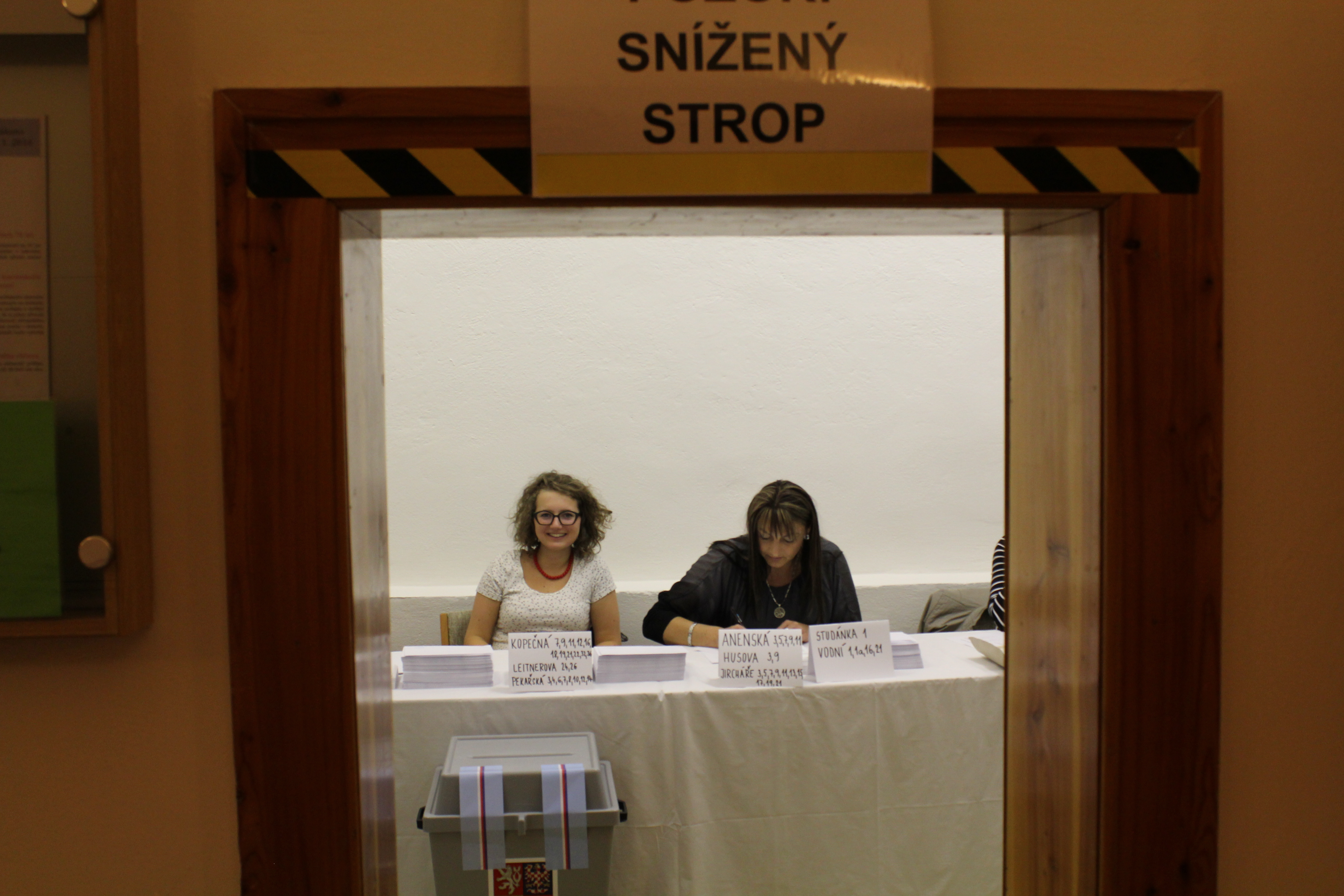 Volební okrsková komise viděna z veřejného prostoru